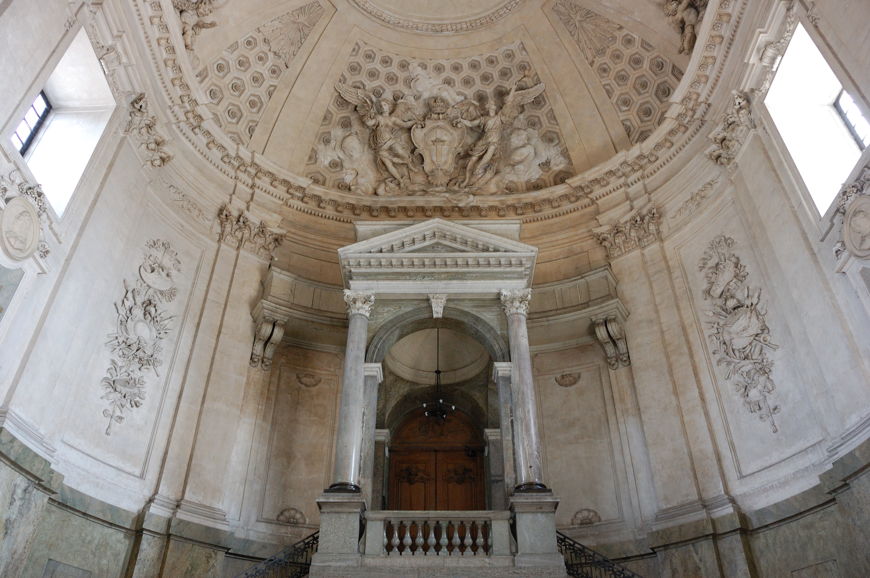 Stockholm Palace